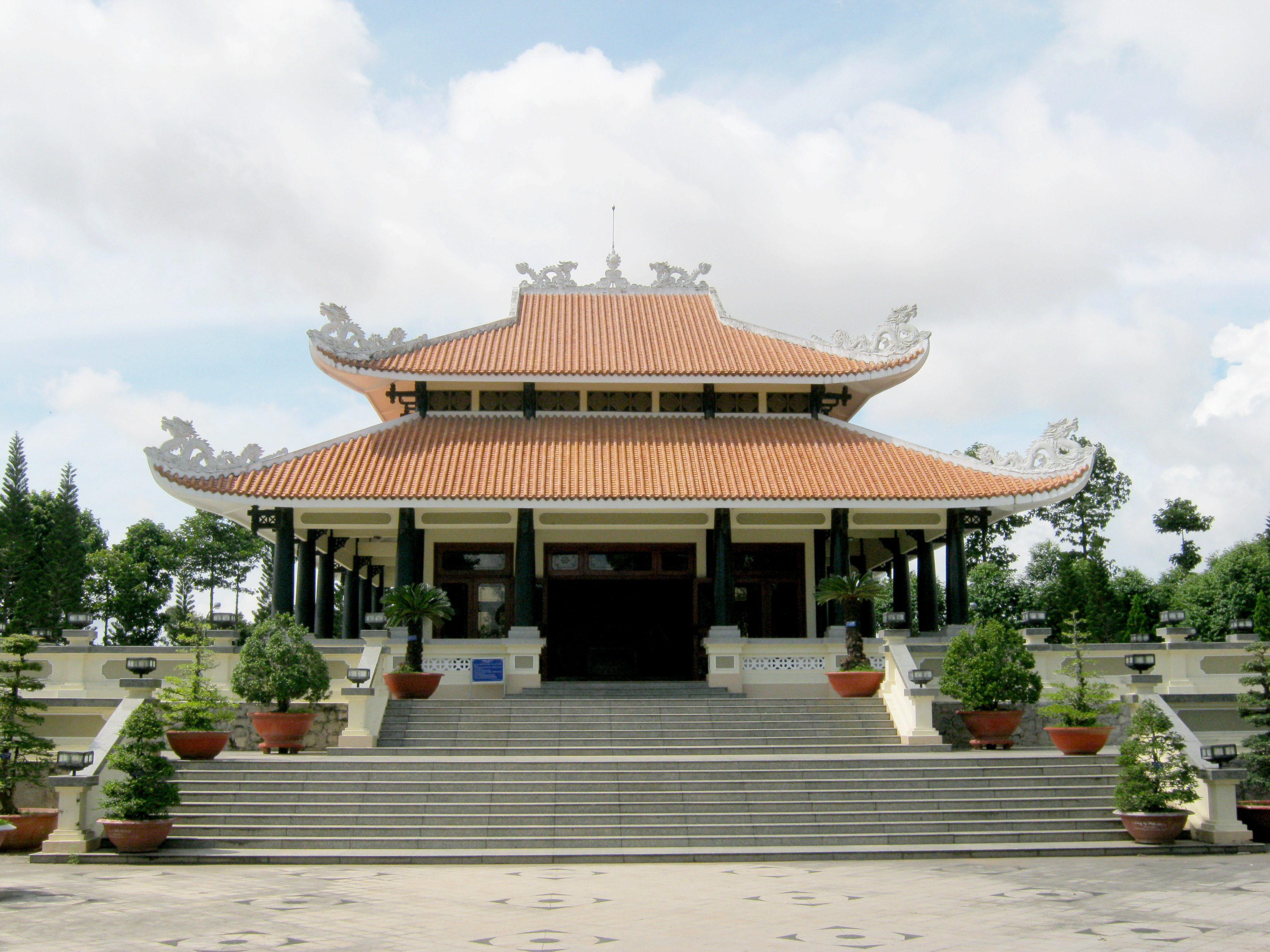 Đền thờ Chủ tịch Tôn Đức Thắng (1888 - 1980) tọa lạc trong khu lưu niệm ông; trên cù lao Ông Hổ, thuộc xã Mỹ Hòa Hưng, thành phố Long Xuyên, tỉnh An Giang, Việt Nam.